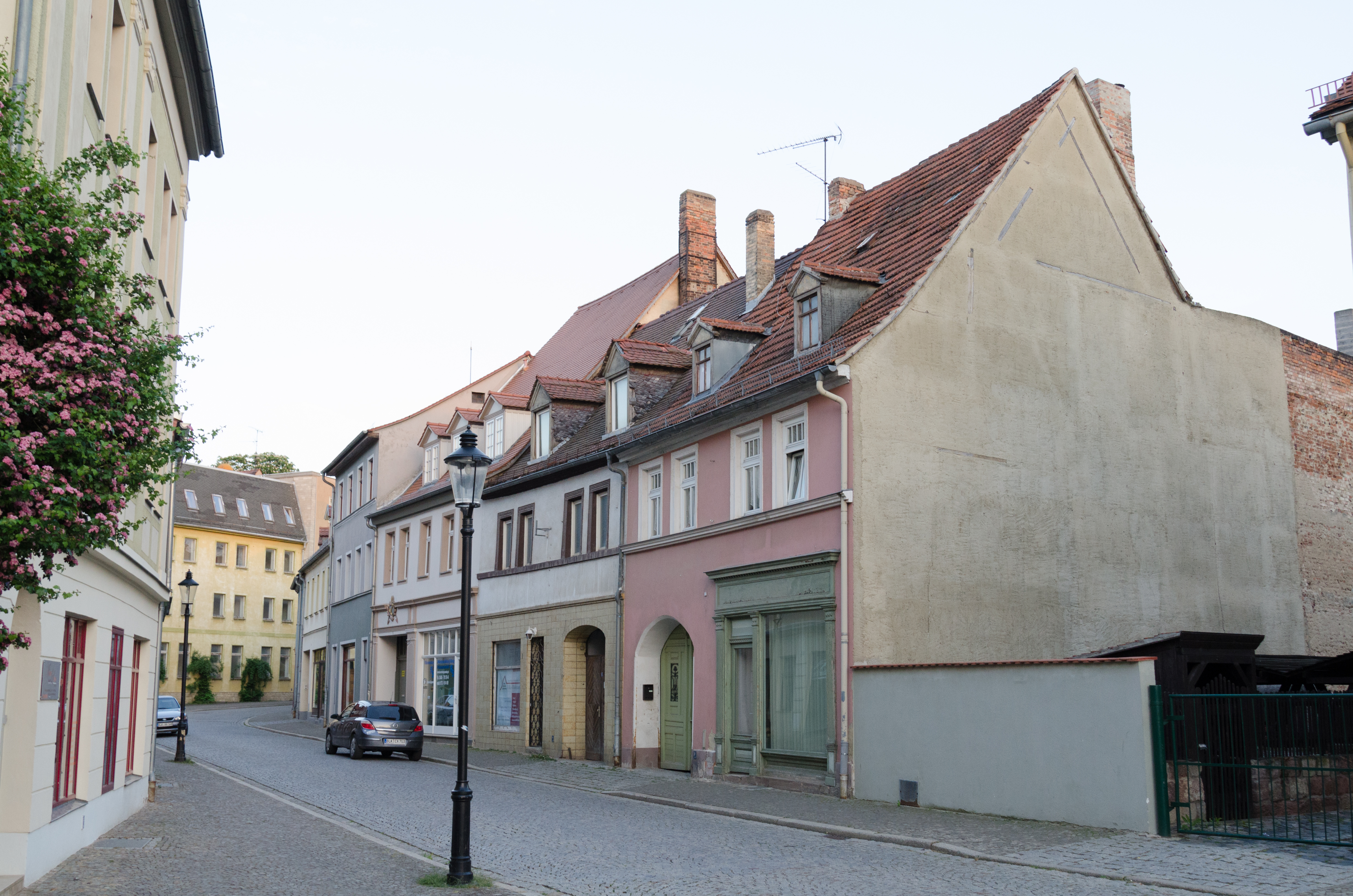 Naumburg, Wenzelsstaße 13, 14, 15, 16, 17